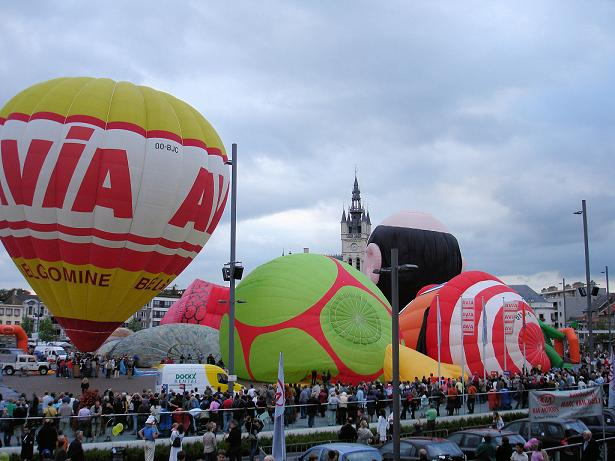 Ballons tijdens de Vredesfeesten.